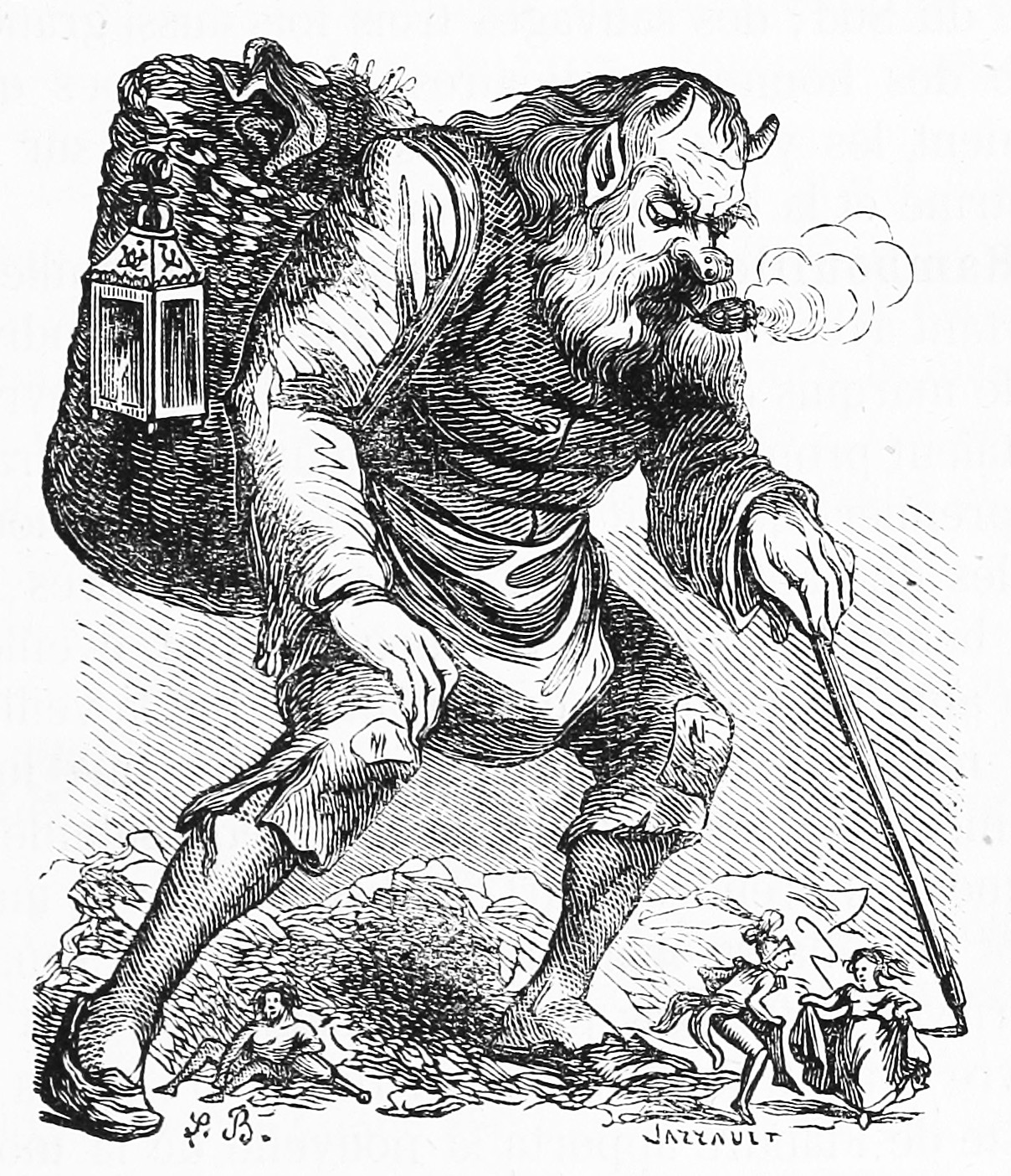 Rahouart. Illustration du Dictionnaire infernal de Jacques Auguste Simon Collin de Plancy par Louis Le Breton, 6eme édition, 1863.